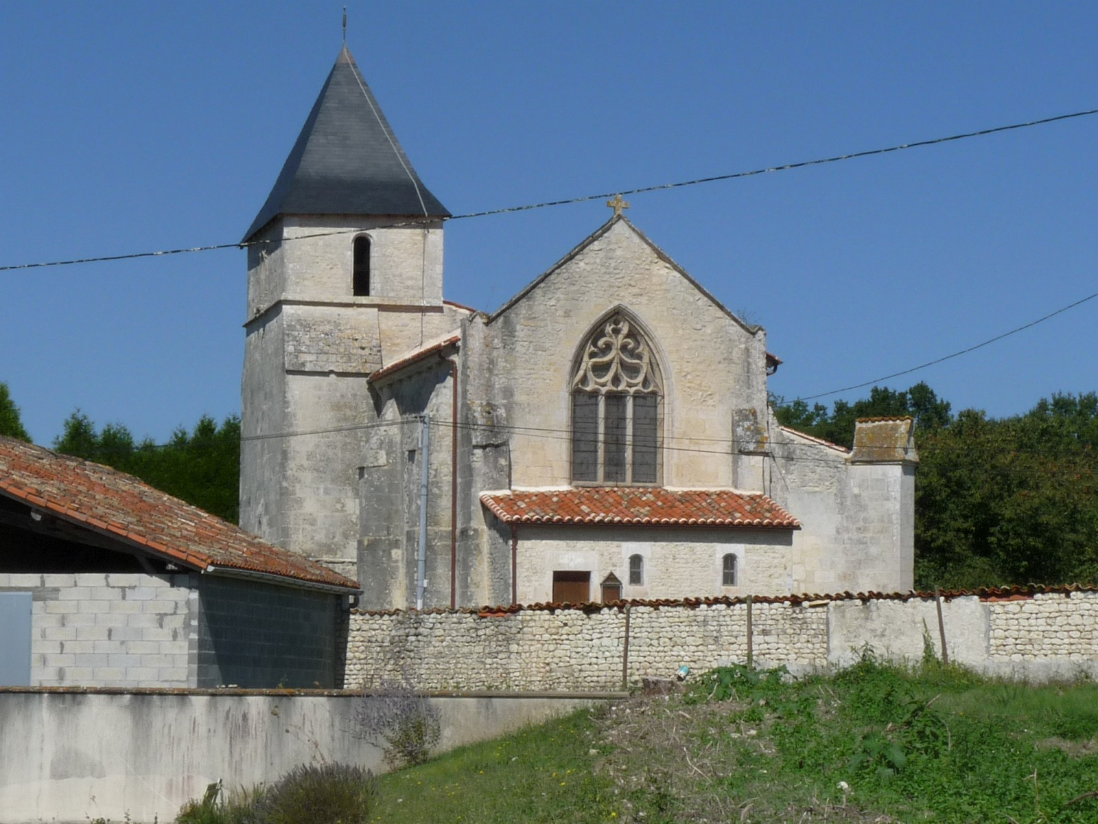 Eglise de Mortiers, Charente-Maritime, France